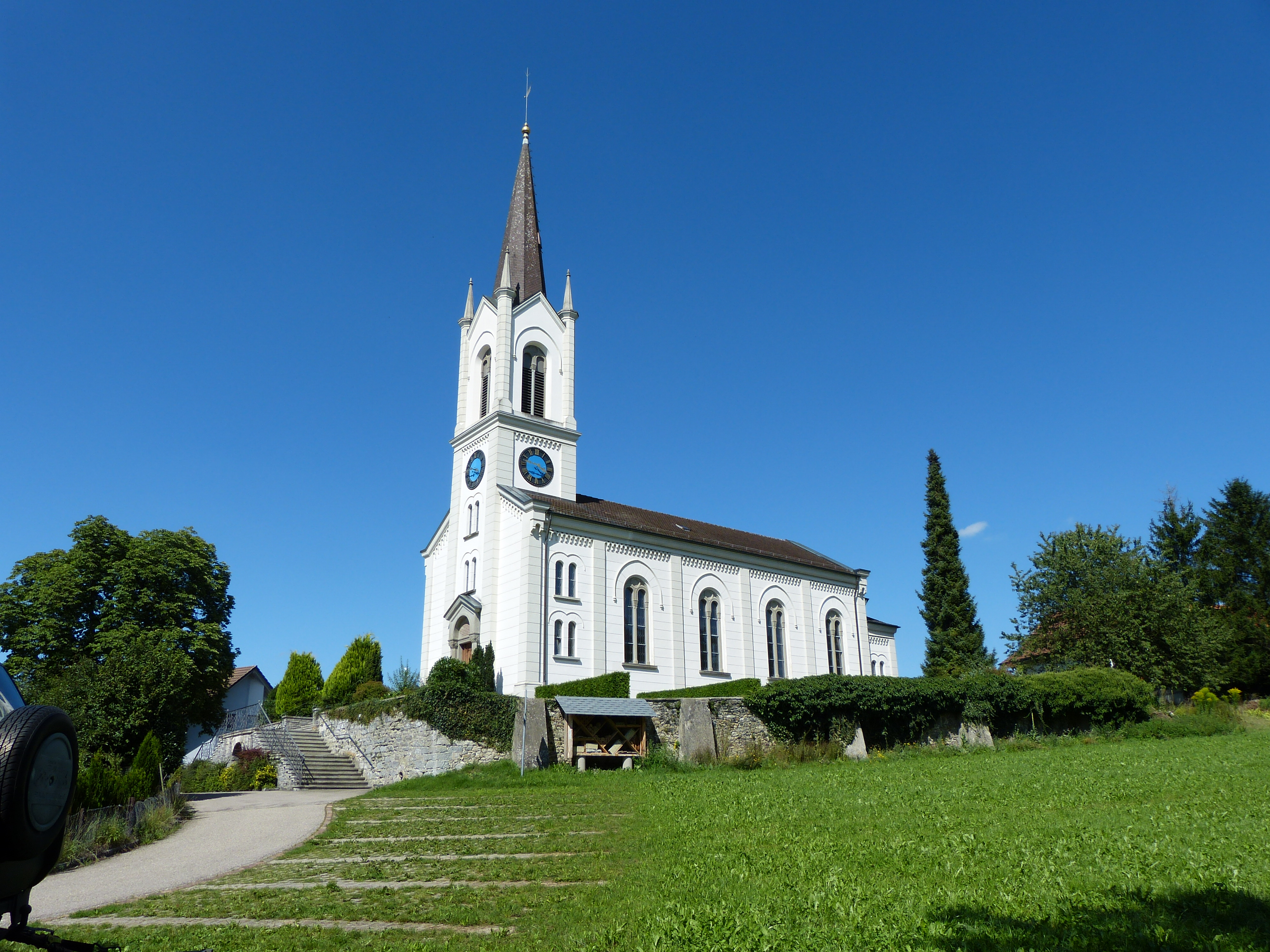 Reformierte Kirche Märwil